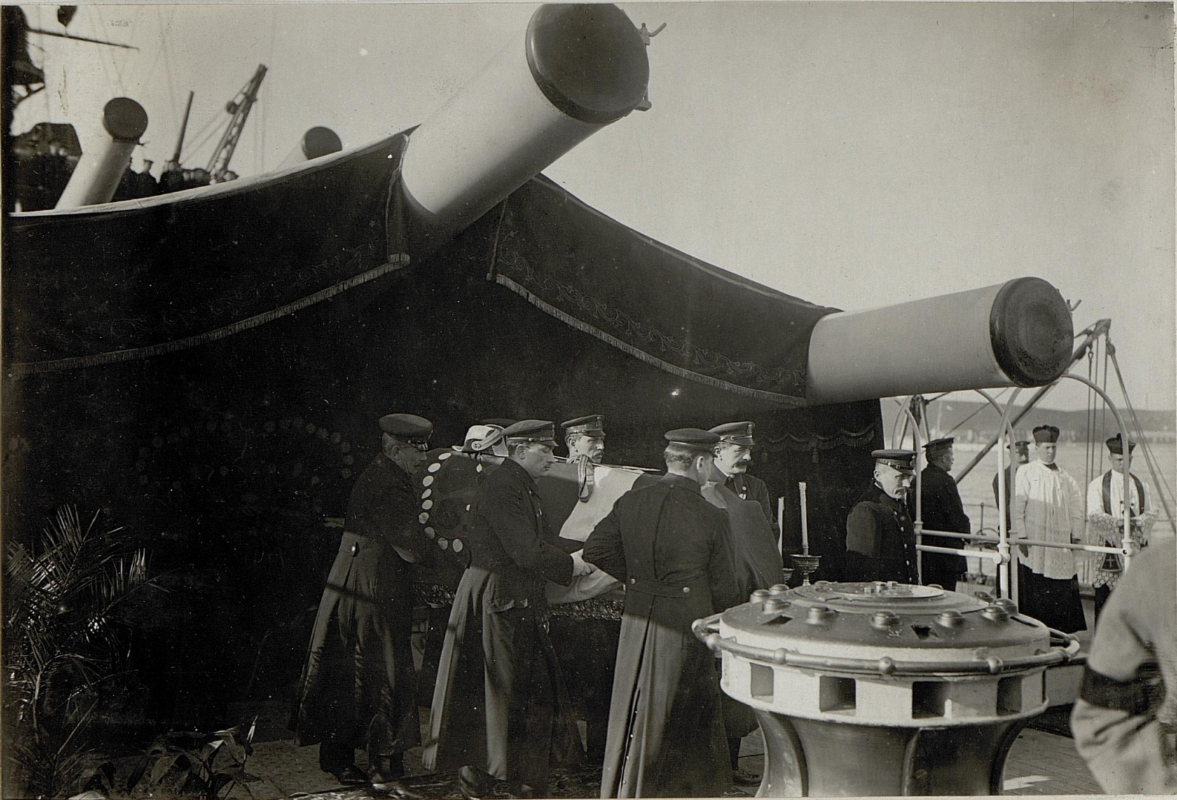 Grossadmiral Haus verstarb auf seinem Flaggschiff Viribus Unitis am 8.2.1917